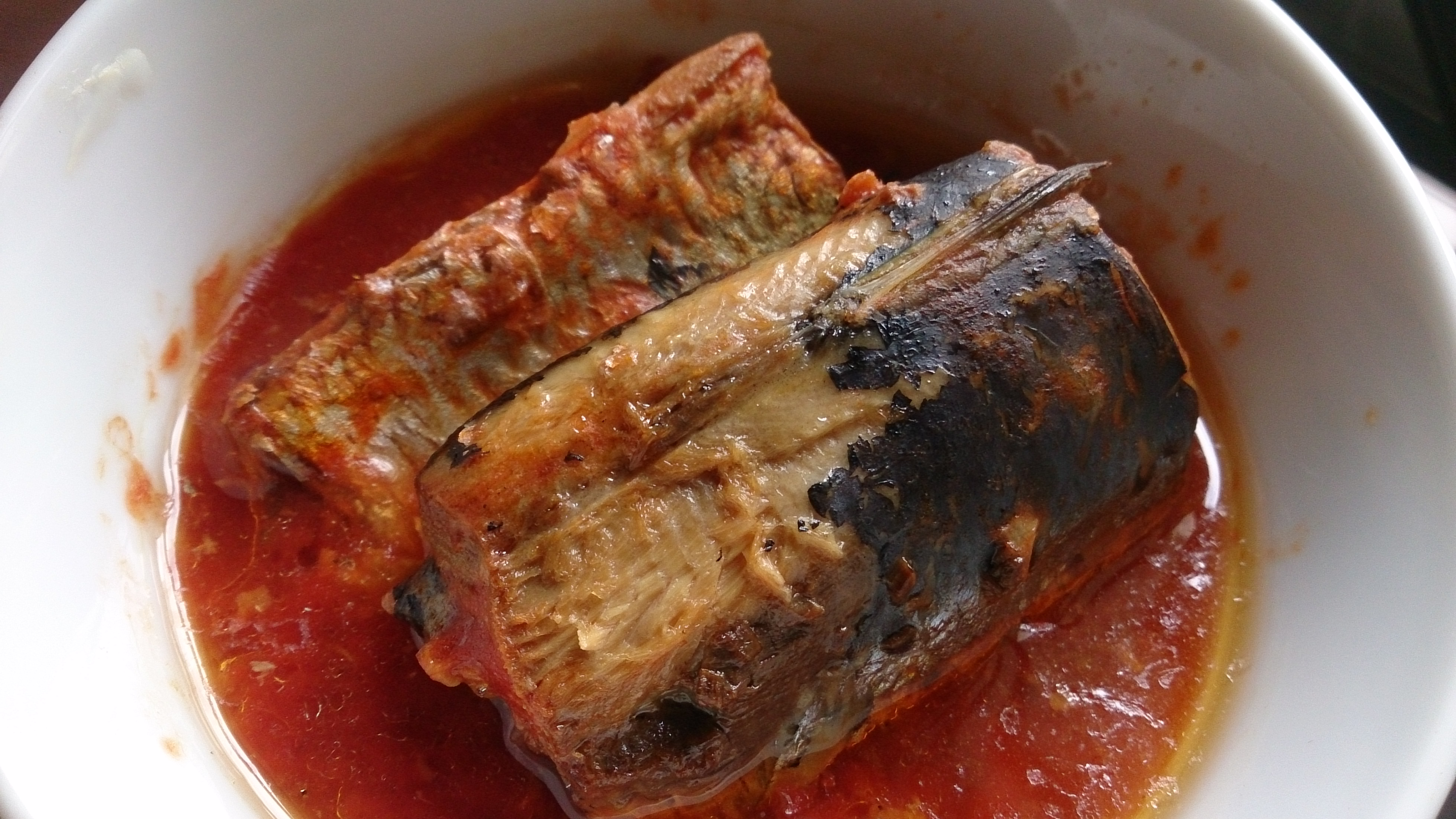 delicious